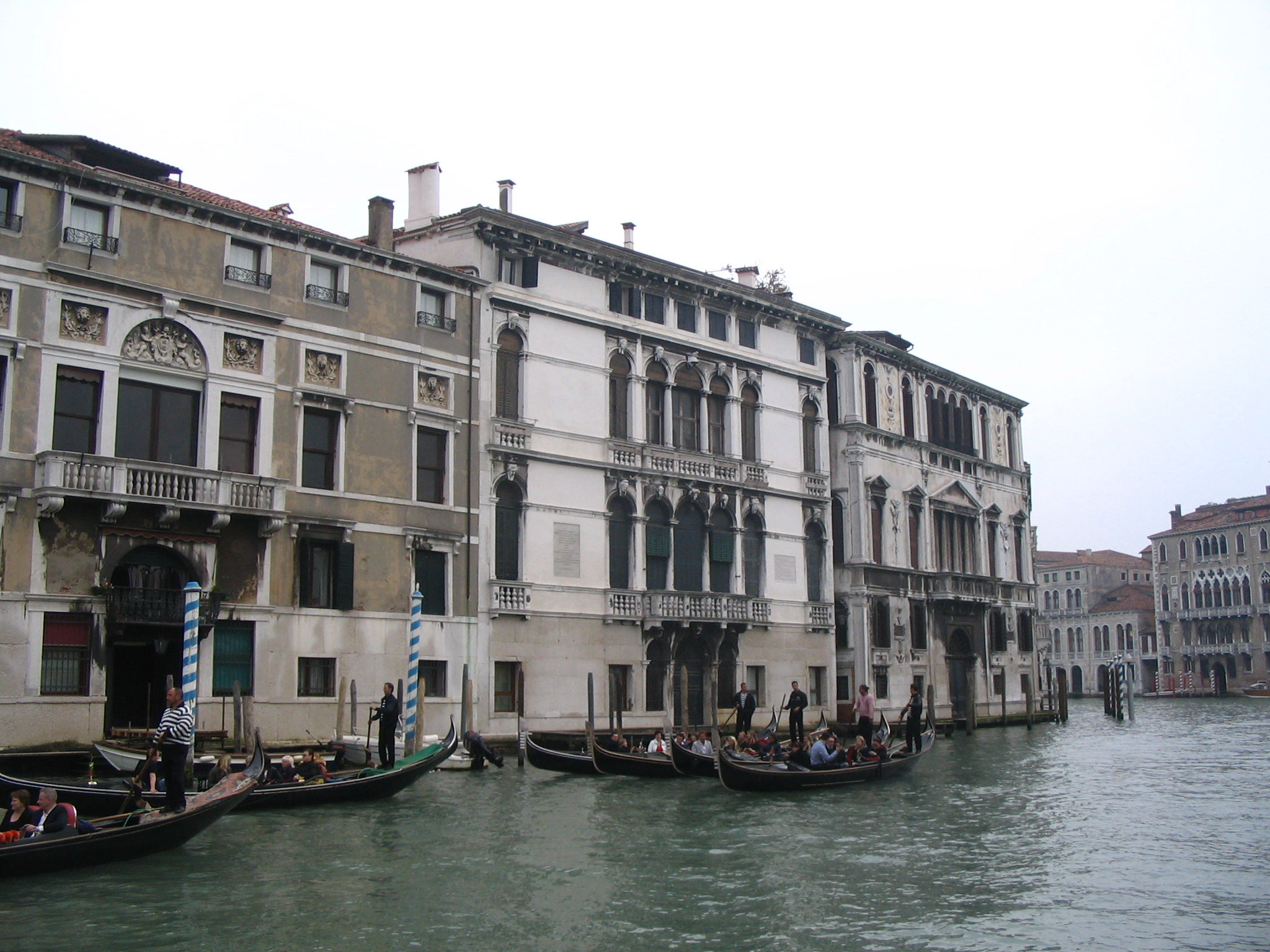 Ca' Mocenigo Vecchia - Grand canal Venise